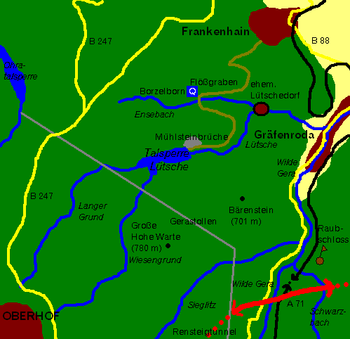 Karte des Lütsche-Gebietes im Ilm-Kreis.